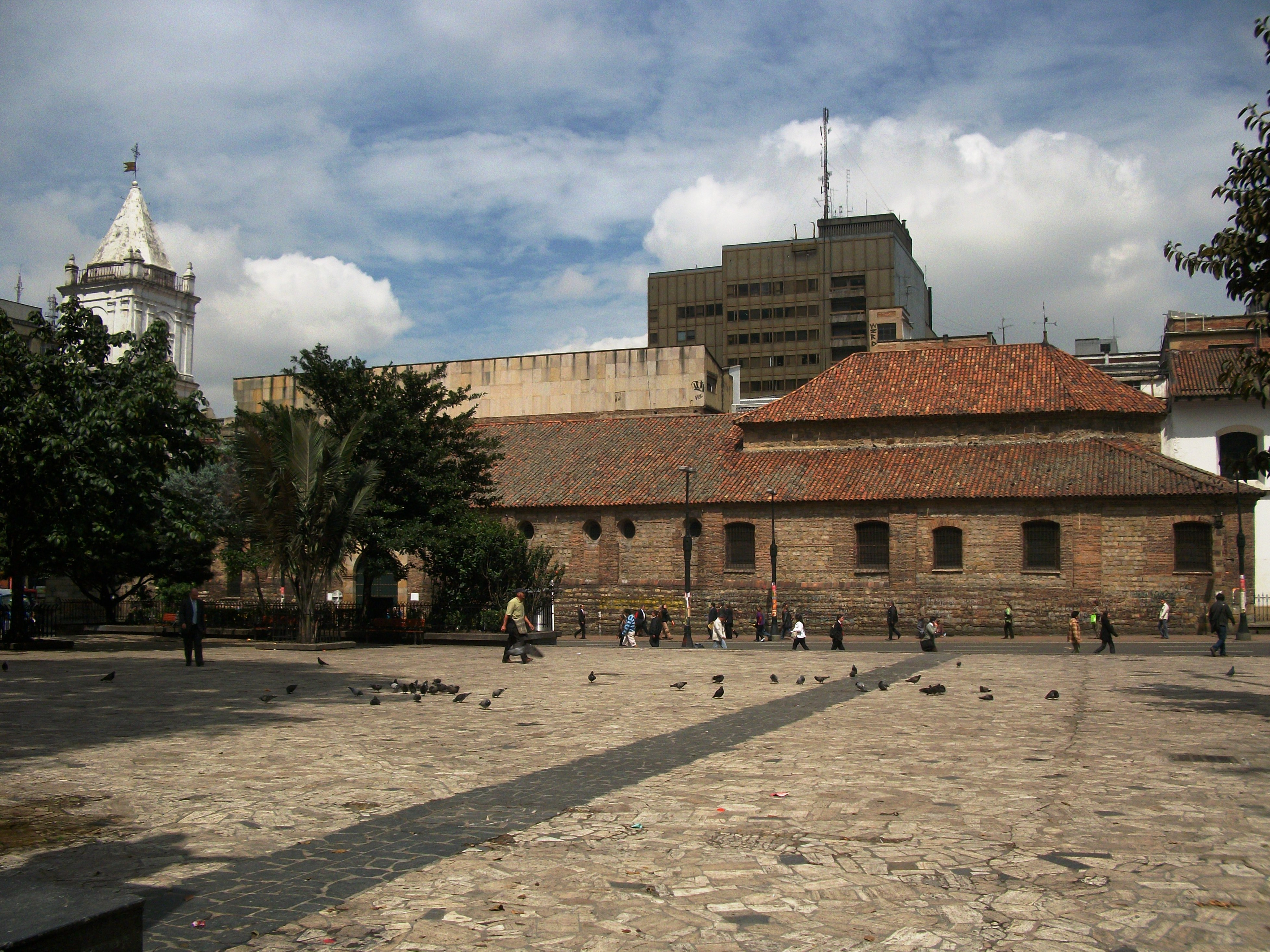 Iglesia de San Francisco, en Bogotá, desde el parque Santander. Cra 7 con clle 16.